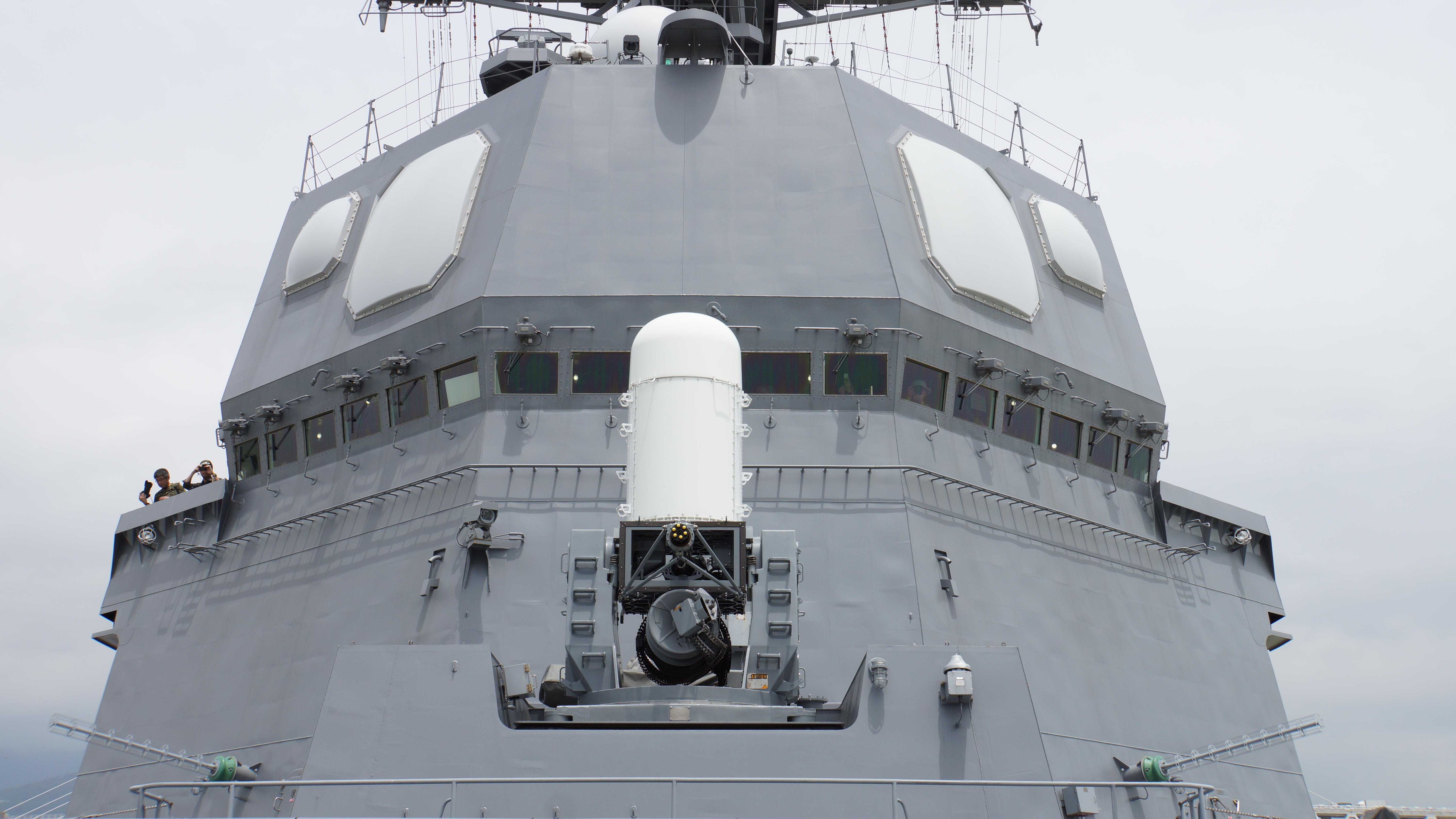 海上自衛隊 護衛艦すずつき（DD-117） 艦橋正面。 15年7月18日 阪神基地にて。